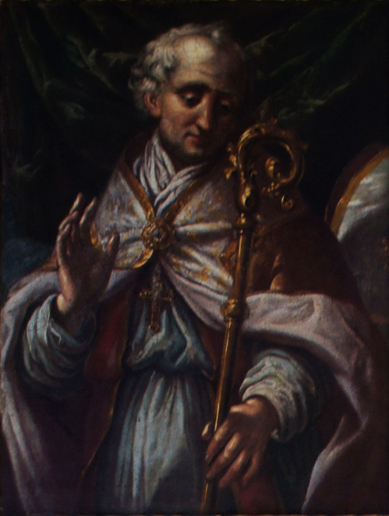 Porträtgemälde von Albert II. von Hohenberg, Fürstbischof von Freising, im Fürstengang zwischen Fürstbischöflicher Residenz und Freisinger Dom.